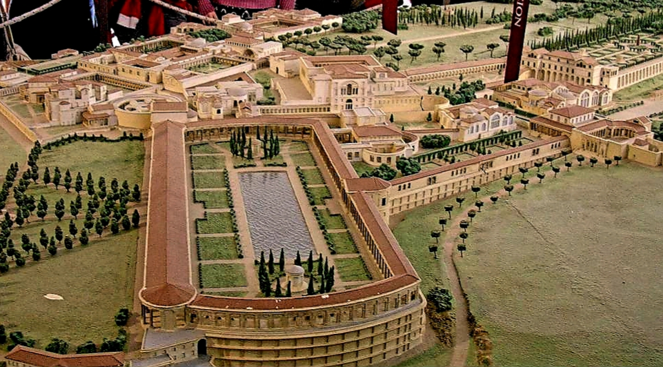 Maquette de la Villa d'Hadrien Lieu : Villa d'Hadrien Auteur Guilhem Dulous